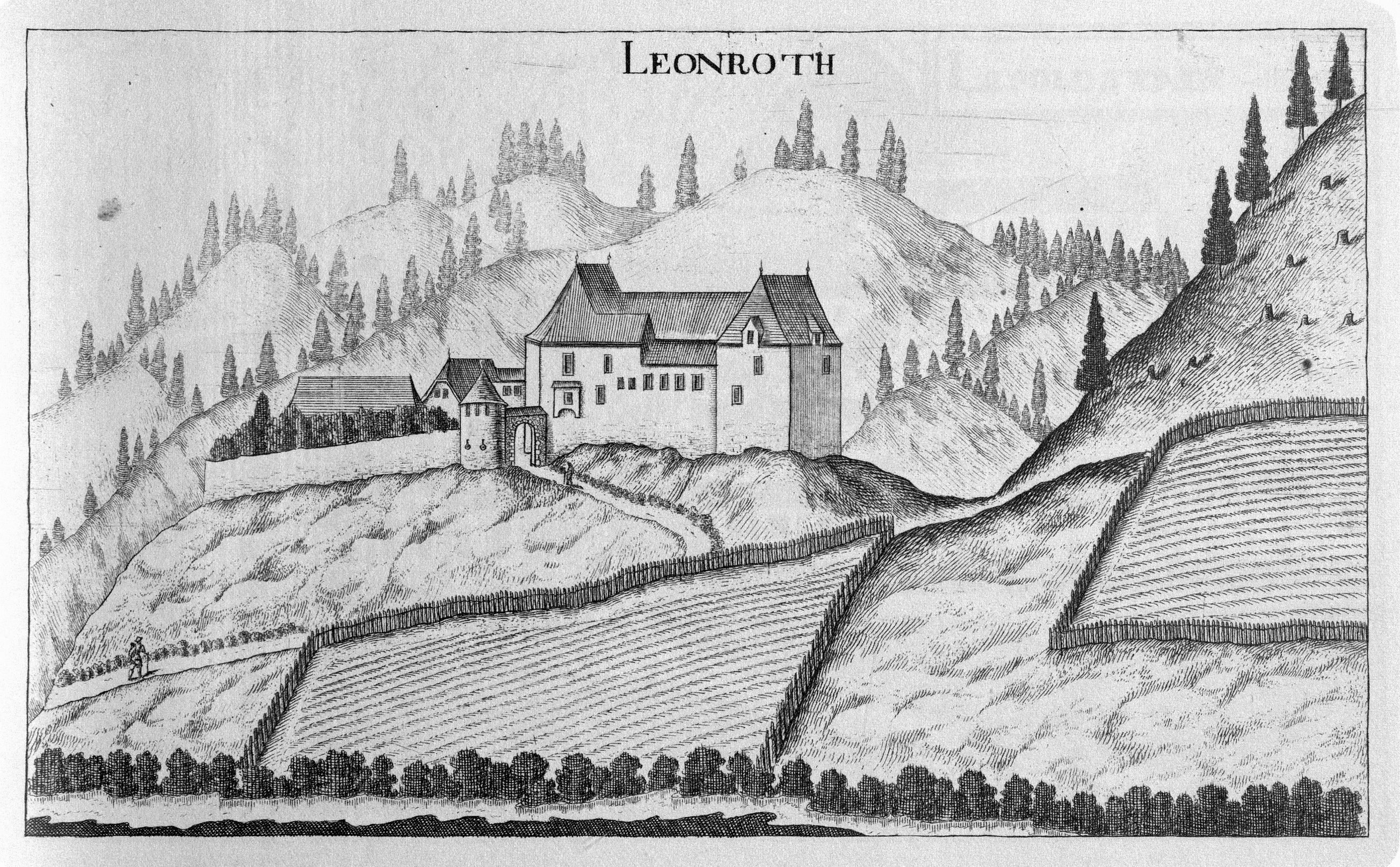 G. M. Vischers Käyserlichen Geographi, Topographia Ducatus Stiriae, Das ist: Eigentliche Delineation / und Abbildung aller Städte / Schlösser / Marcktfleck / Lustgärten / Probsteyen / Stiffter / Clöster und Kirchen / so es sich im Herzogthumb Steyrmarck befinden; Und anjetzo Umb einen billichen Preyß zu finden seynd Bey Johann Bitsch Universitäts Buchhandlern / Auff dem Juden=Platz bey der guldenen Saulen. Graz 1681 Die Nummerierung der Dateien folgt der alphabetischen Reihung der Ortsnamen